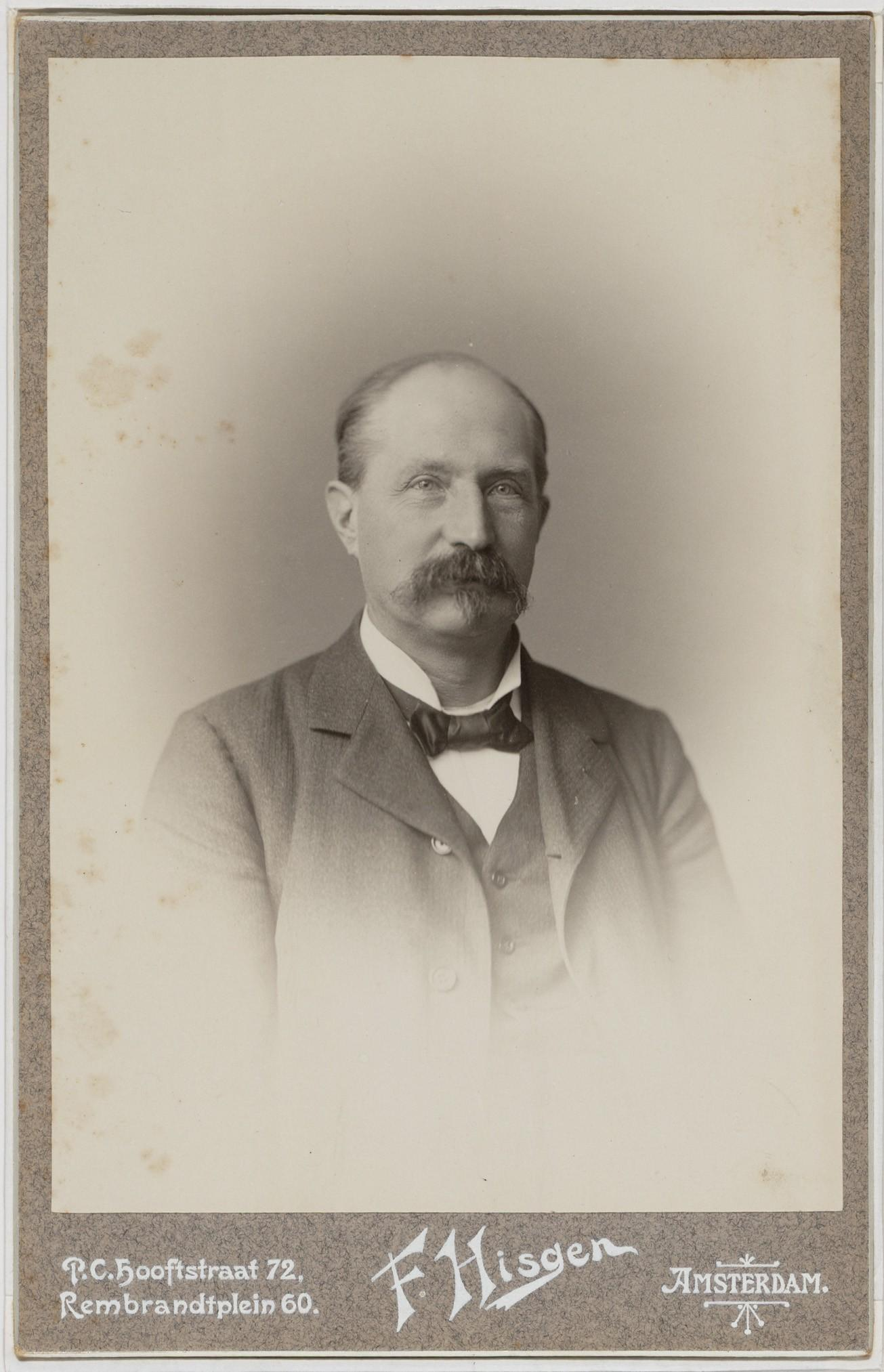 Beschrijving Dr. D.J. Korteweg (31-03-1848 / 10-05-1941) Hoogleraar wiskunde en mechanica. Documenttype foto Vervaardiger Hisgen, F. Collectie Collectie Stadsarchief Amsterdam: foto-afdrukken Inventarissen Afbeeldingsbestand OSIM00006002523